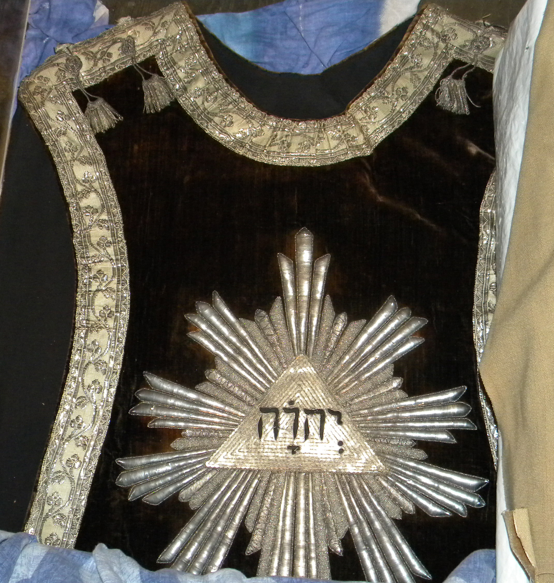 Mässhake från 1680-talet med tetragrammet JHWH i Kropps kyrka